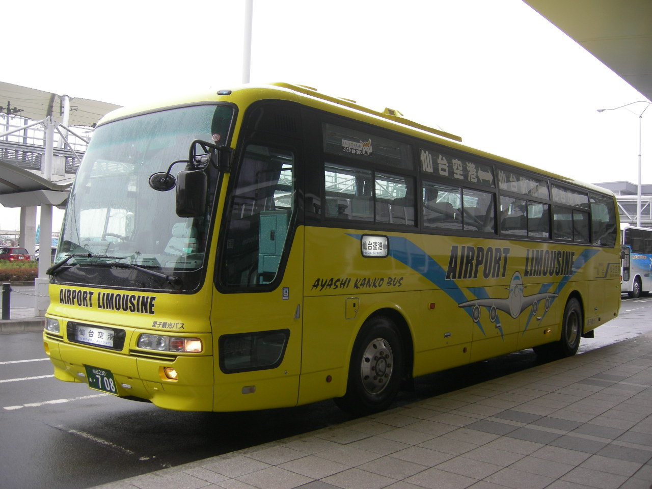 愛子観光バス エアポートリムジンバス（Ayashi-kanko bus Sendai airport limousine bus）三菱ふそう PJ-MS86JP（仙台230あ･708）